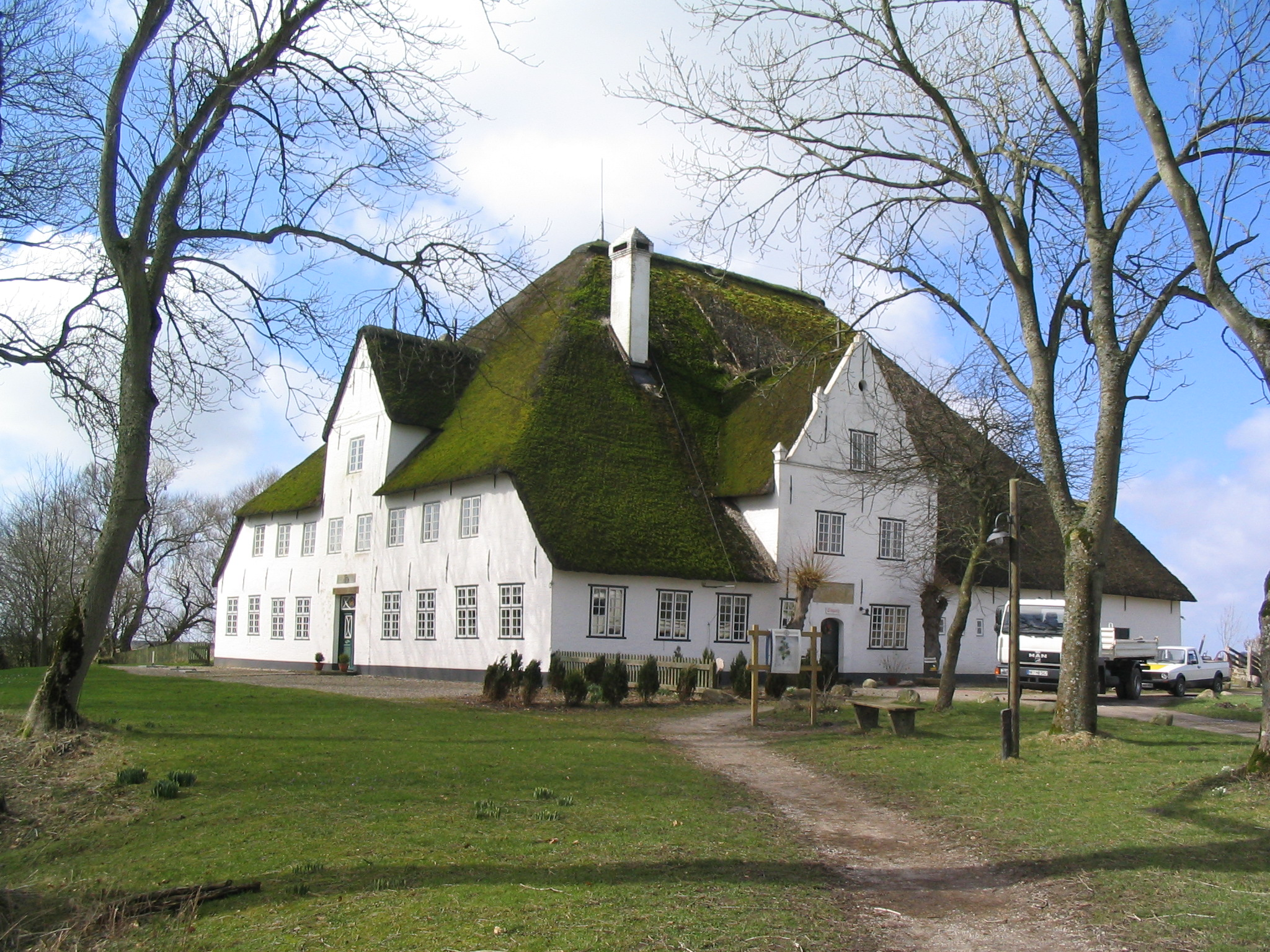 Red Haubarg on Eiderstedt, Nordfriesland